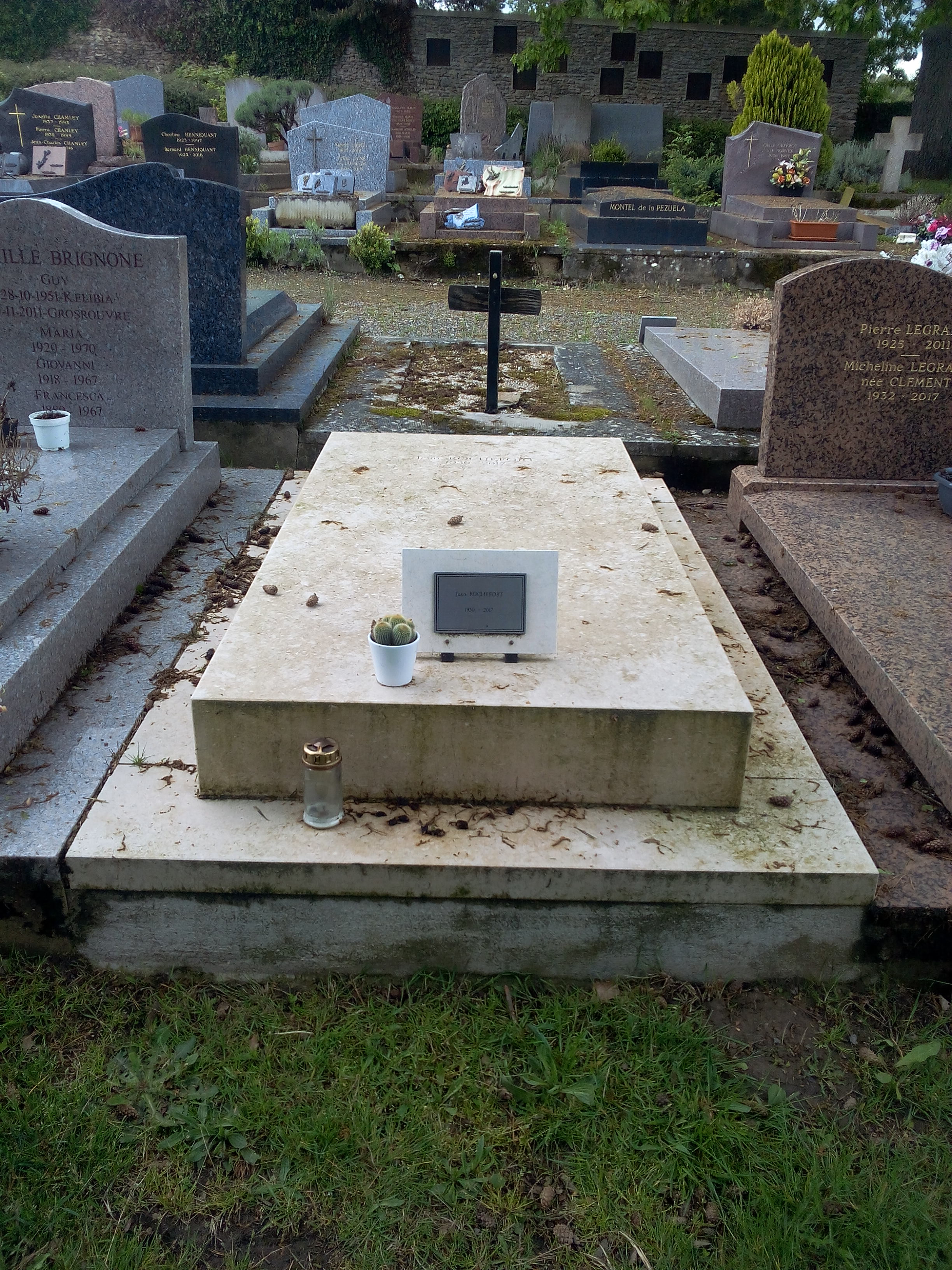 Simple pierre blanche